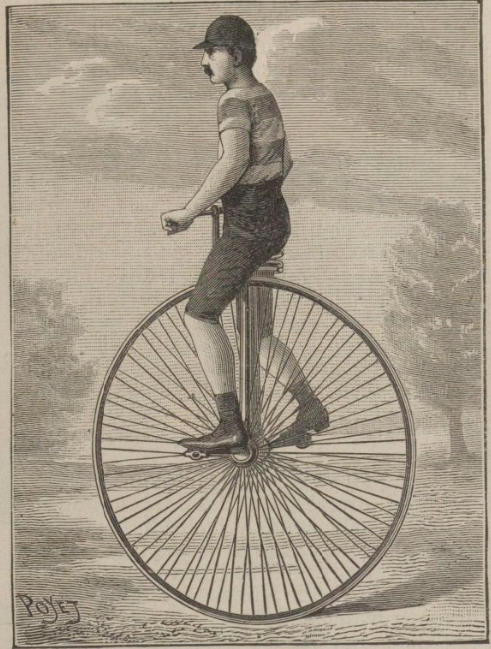 Gravure de monocycliste, signé Payet, tiré de l'article "Vélocipédie", Henry de Graffigny dans "Le Chercheur : journal mensuel illustré des inventions nouvelles", n°9, Mars 1887, p.70